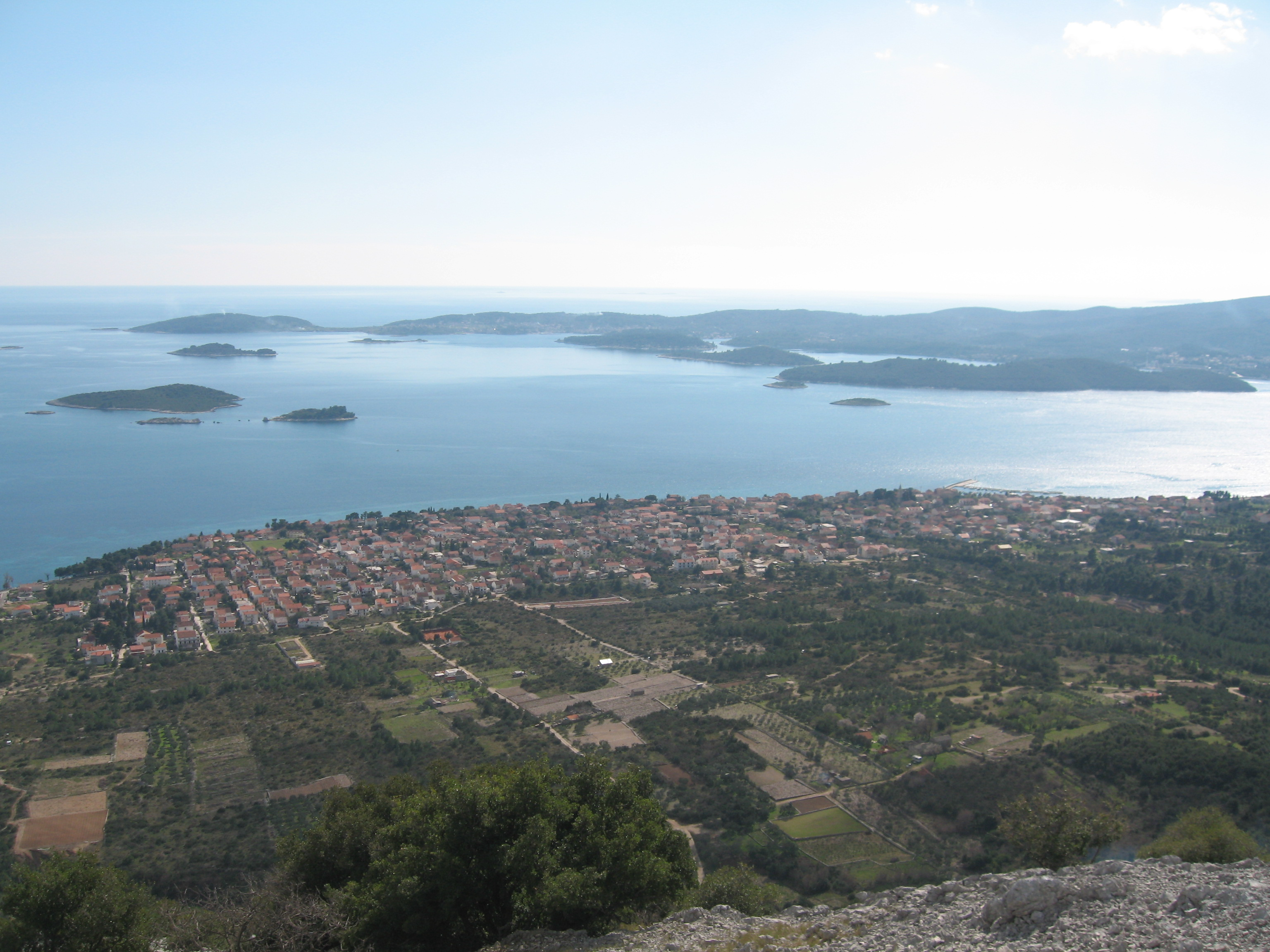 Panorama Orebića sa brda Vižanice